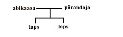 Pärandajal on kaks last ja abikaasa. Kuna lapsed on esimese järjekorra pärijad, siis päib abikaasa nende kõrval võrdselt lapse osaga. Seega pärib kumbki laps 1/3 ja abikaasa samuti 1/3.